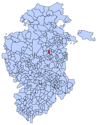 Quintanavides en Burgos